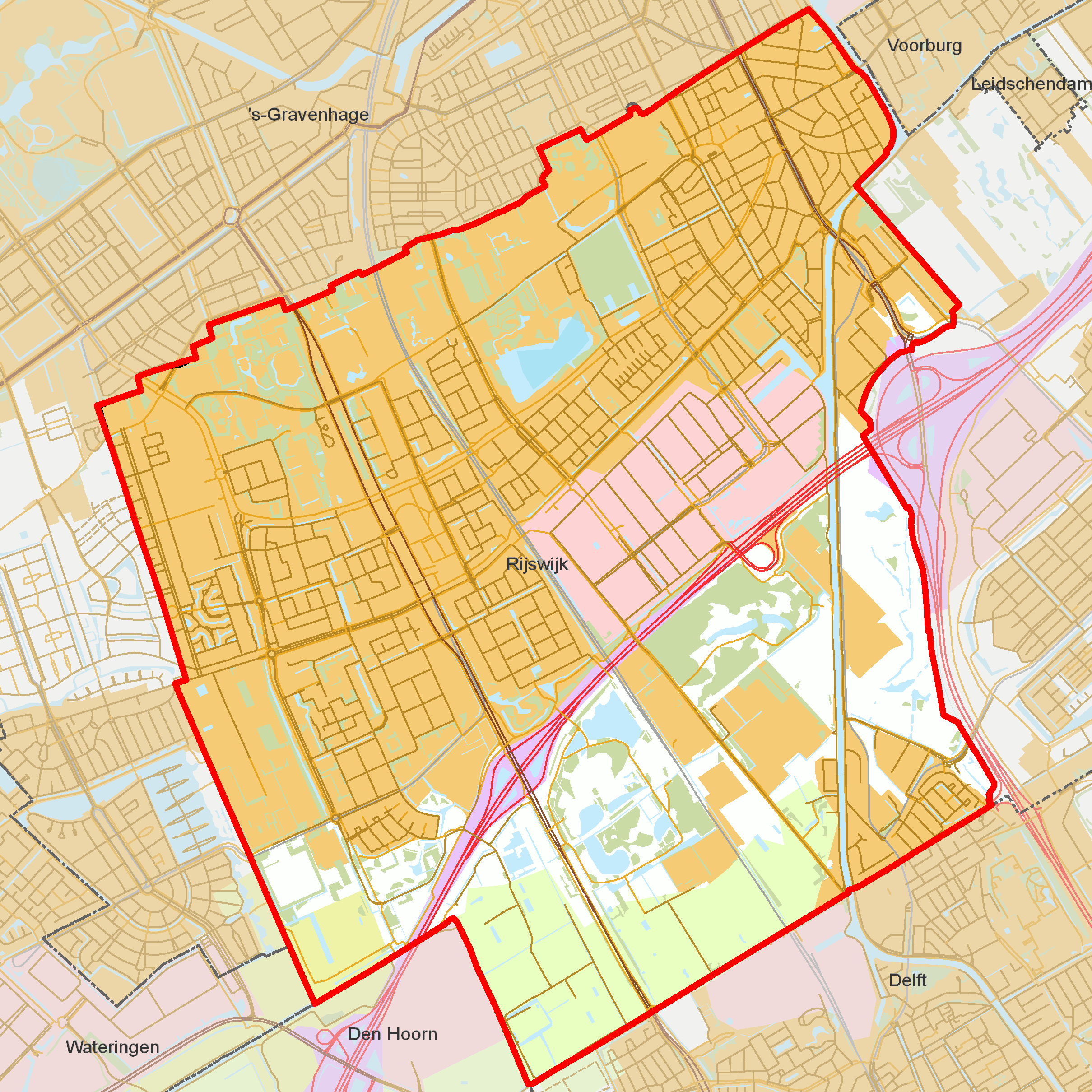 BAG woonplaatsen - Gemeente Rijswijk.png